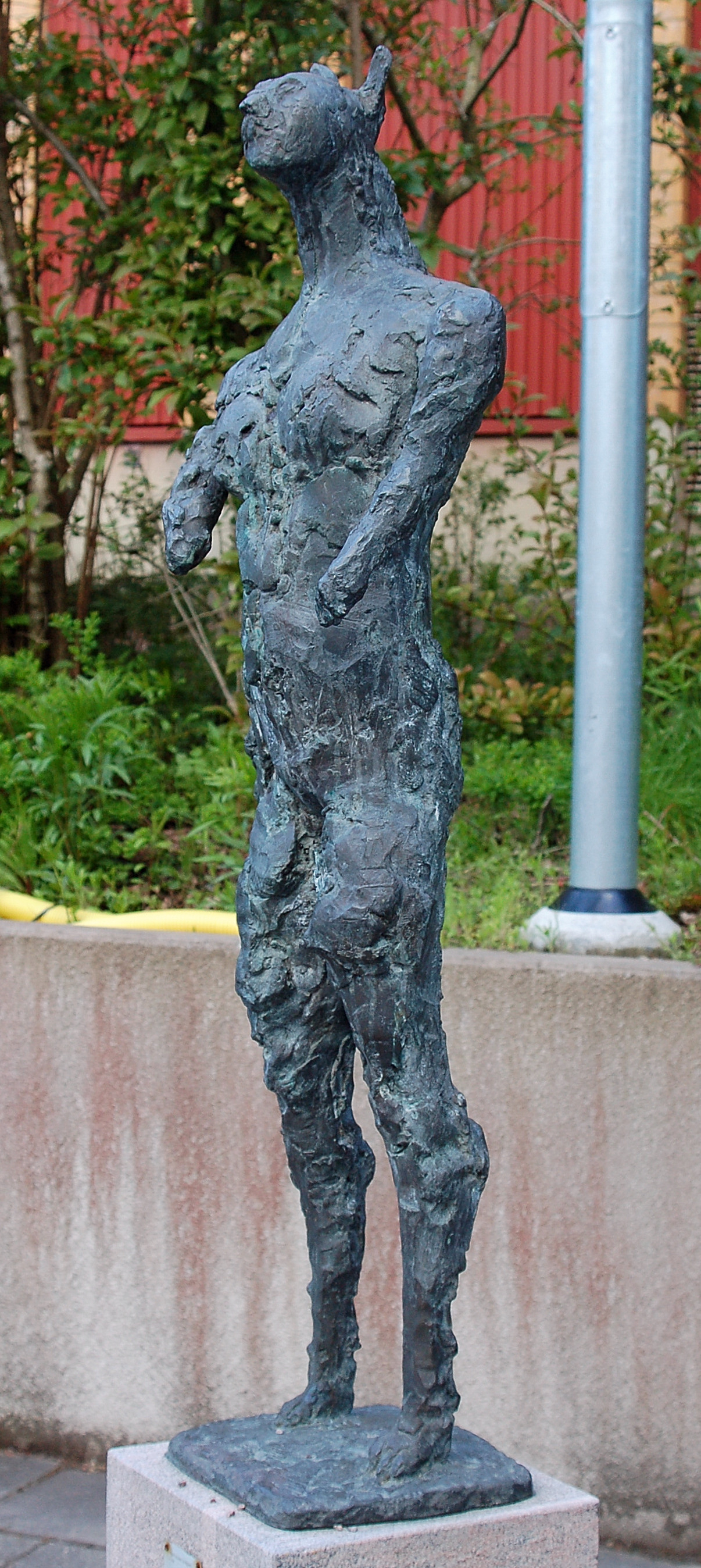 Kattkvinna av Inga-Louise Lindgren 1989 utförd i brons placerad vid Karlstads Universitetet, mellan hus 9 och hus 5.